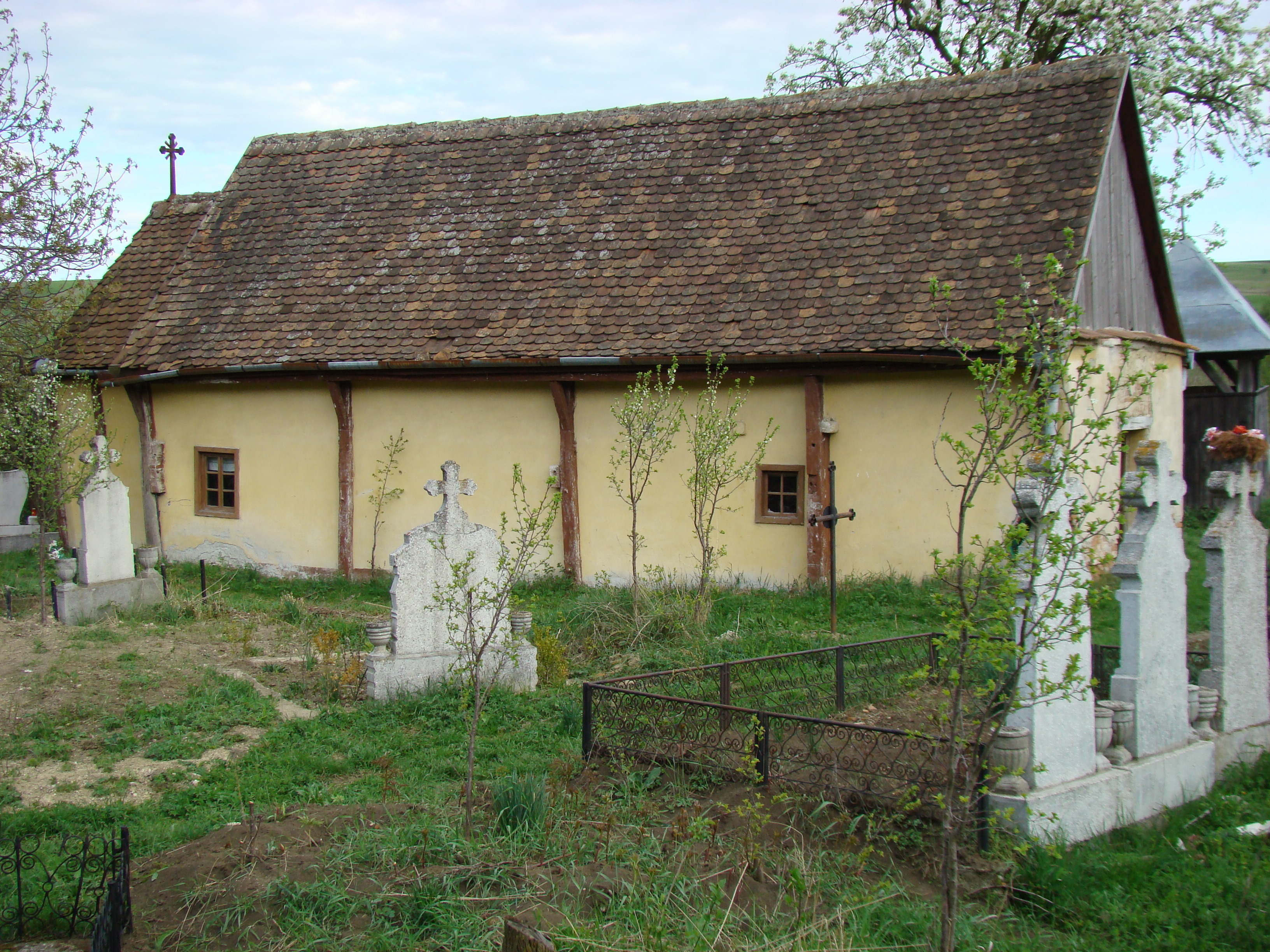 Biserica de lemn din Presaca